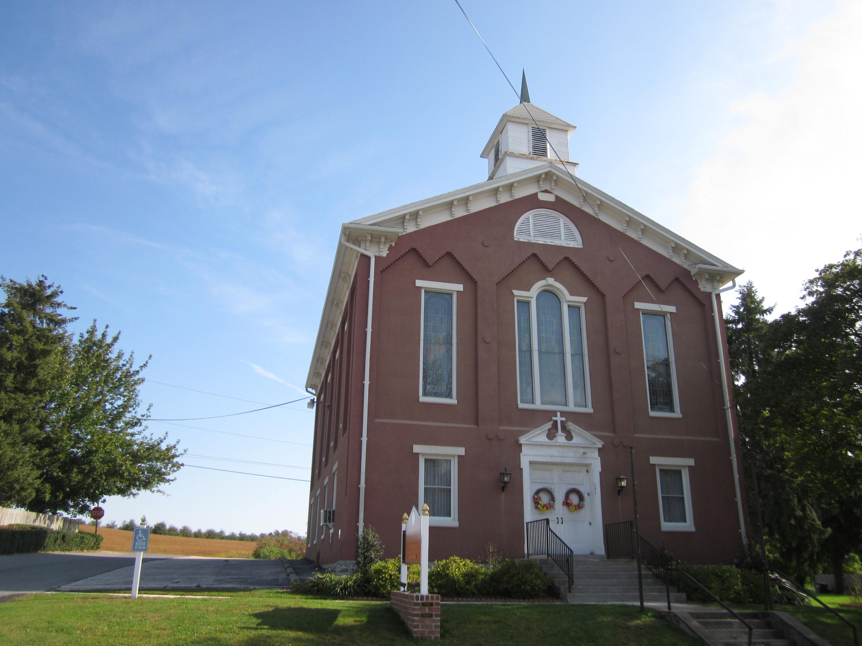 Bendersville, Pennsylvania